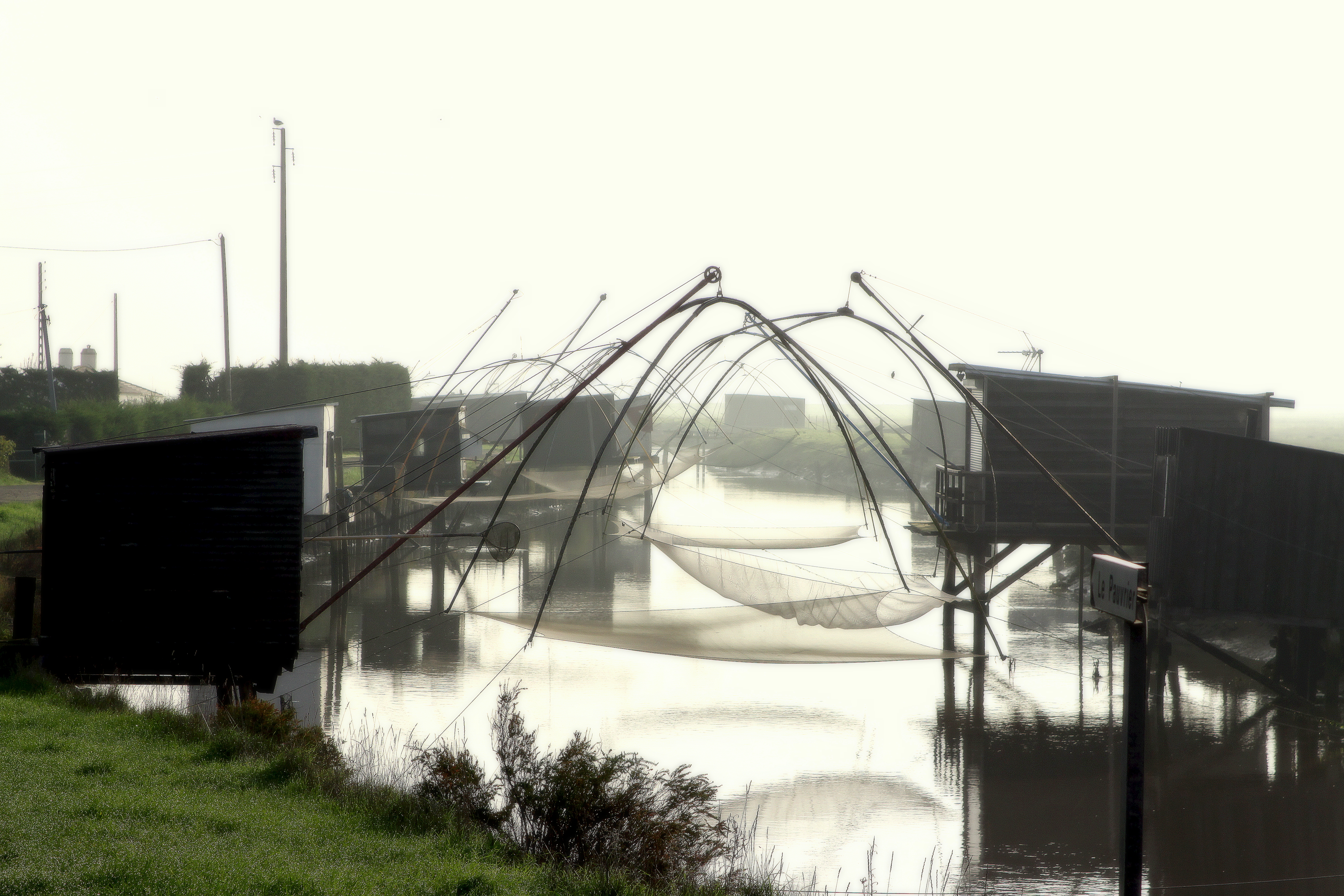 Hiefe mat Haisercher vum Grand Pont um Grand Etier de Sallertaine aus gesinn